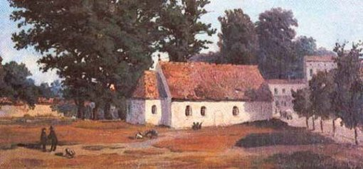 Kościół p.w. św. Idziego w Bydgoszczy - zbud. w XIII w., rozebrany w 1879 r.